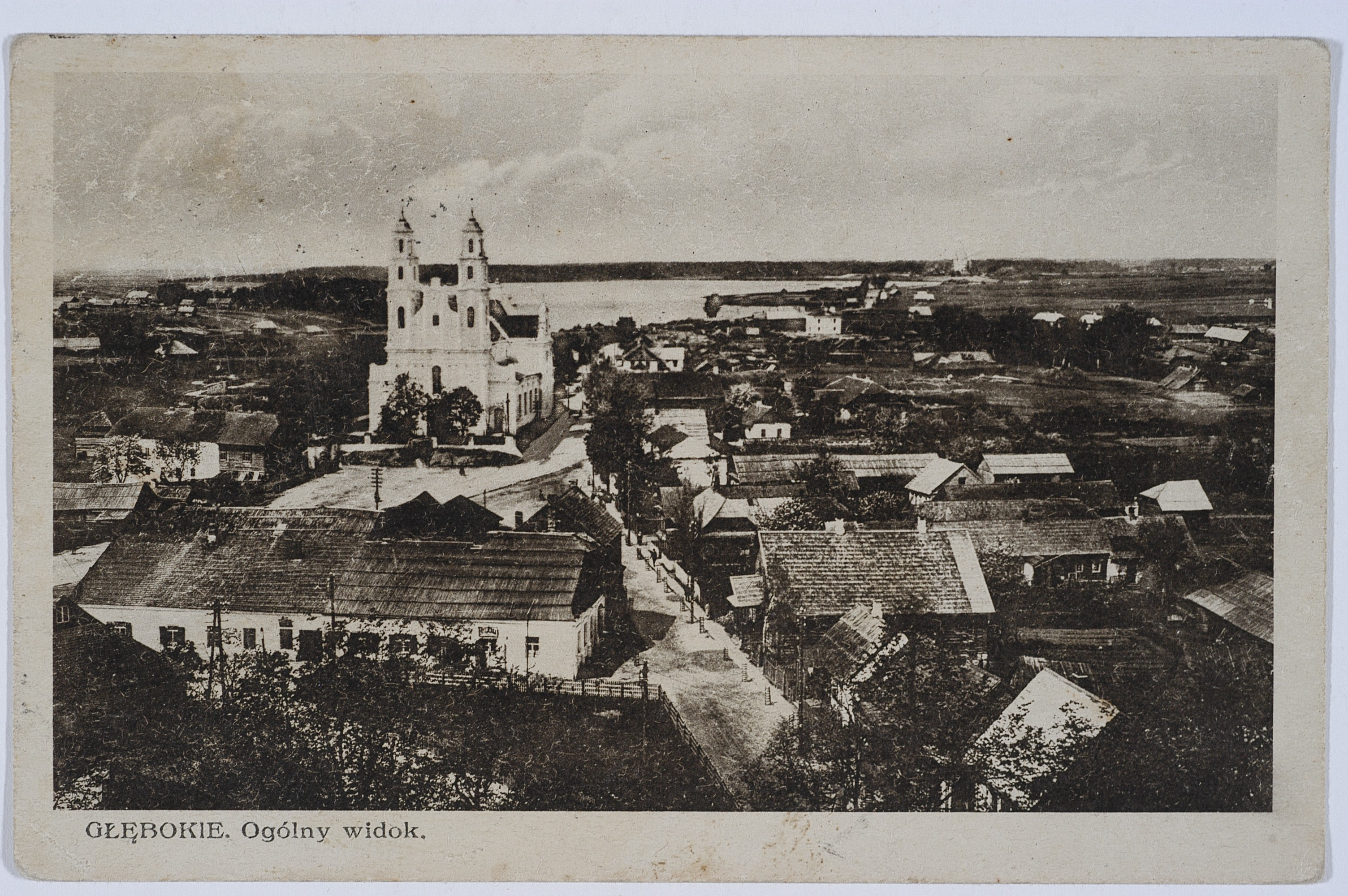 Беларуская (тарашкевіца): Глыбокае (Hłybokaje), пляц Рынак (plac Rynak). Касьцёл Найсьвяцейшай Тройцы.